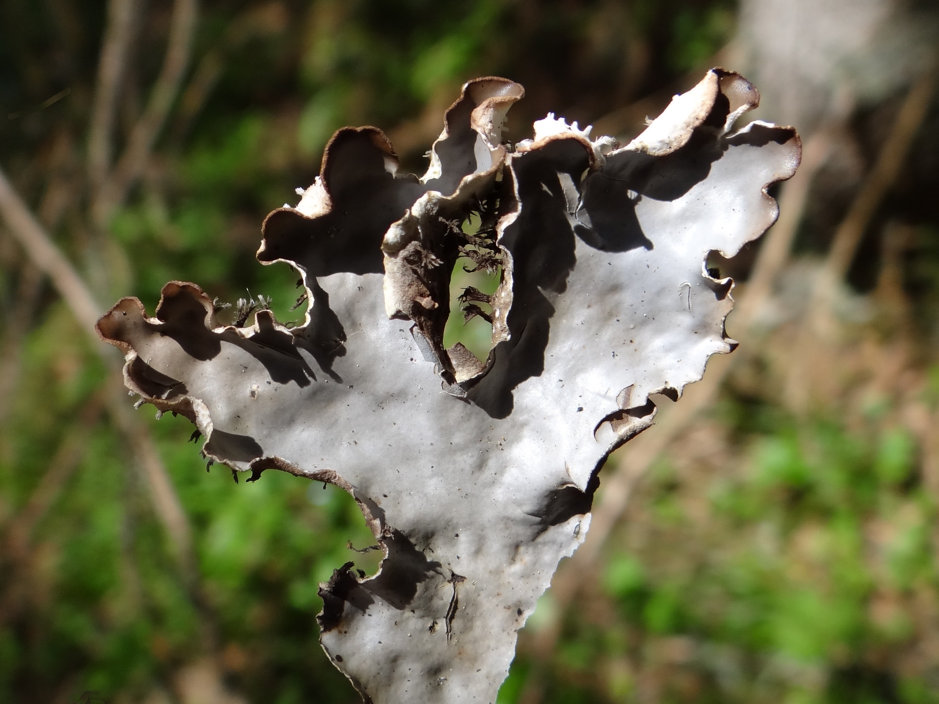 Peltigera rufescens (habitat:West Tatra Mountains, Dolina Tomanowa)